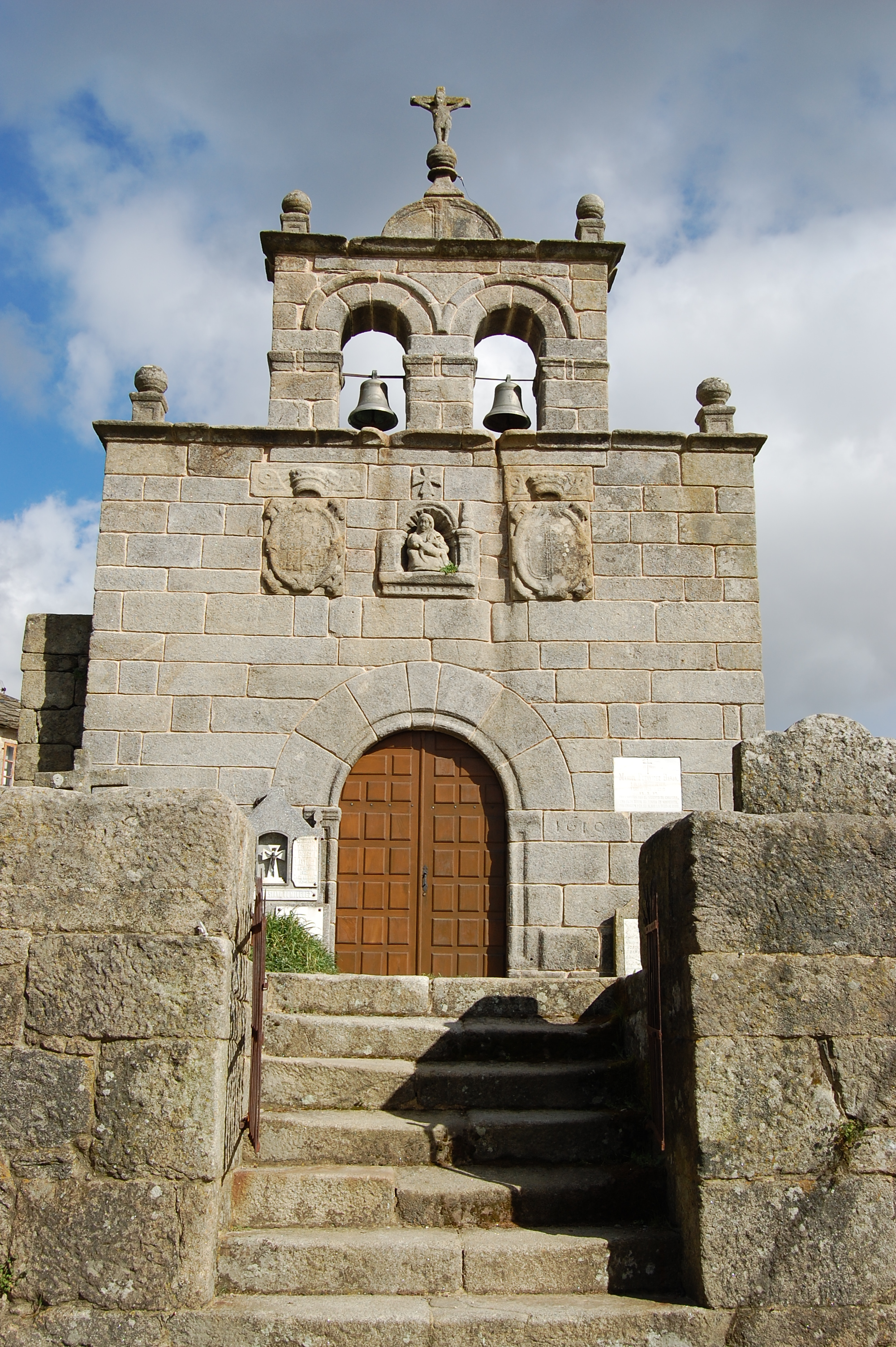 A Gudiña (província de Ourense, Espanha).